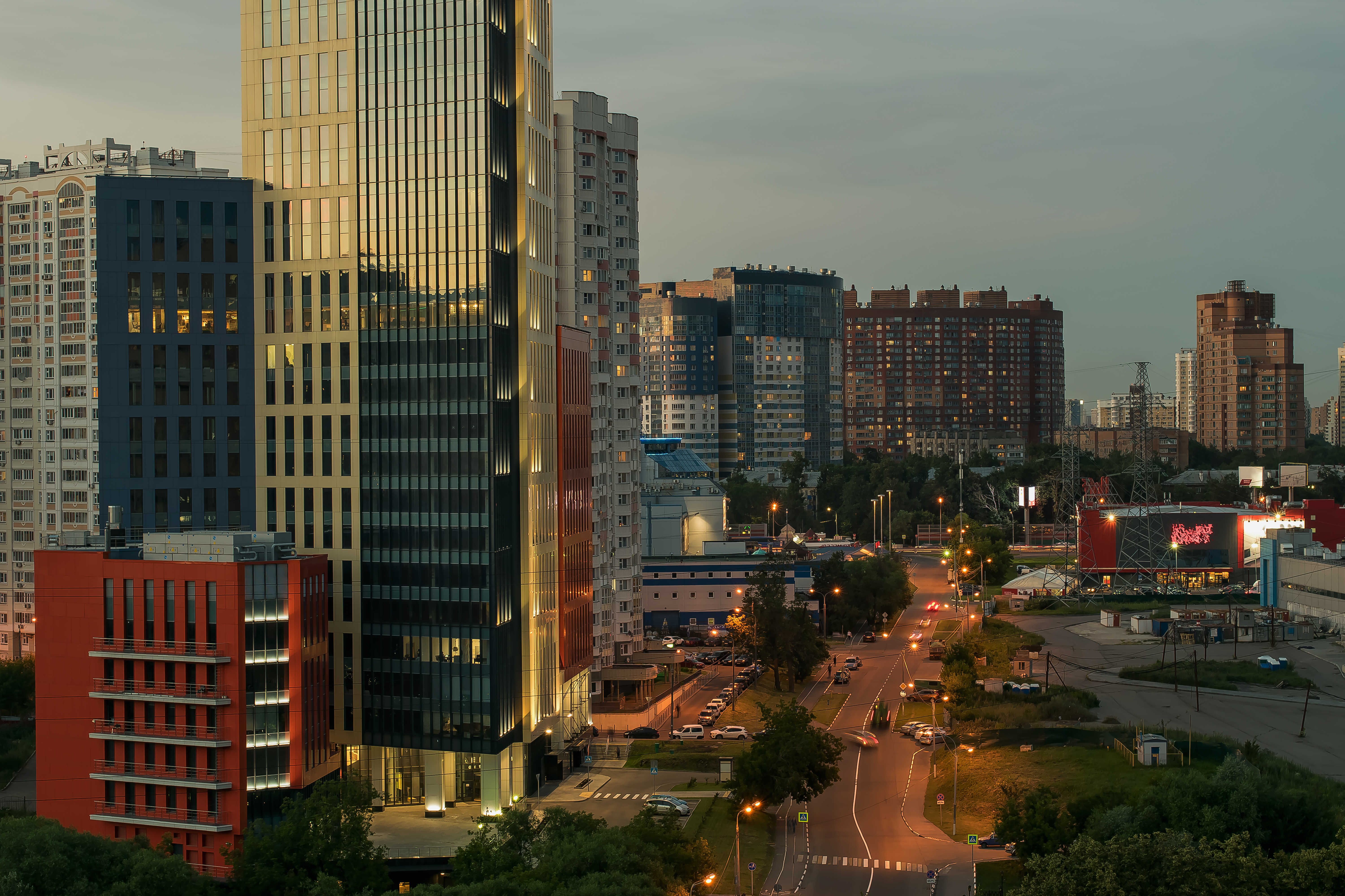 Город Химки вечером.